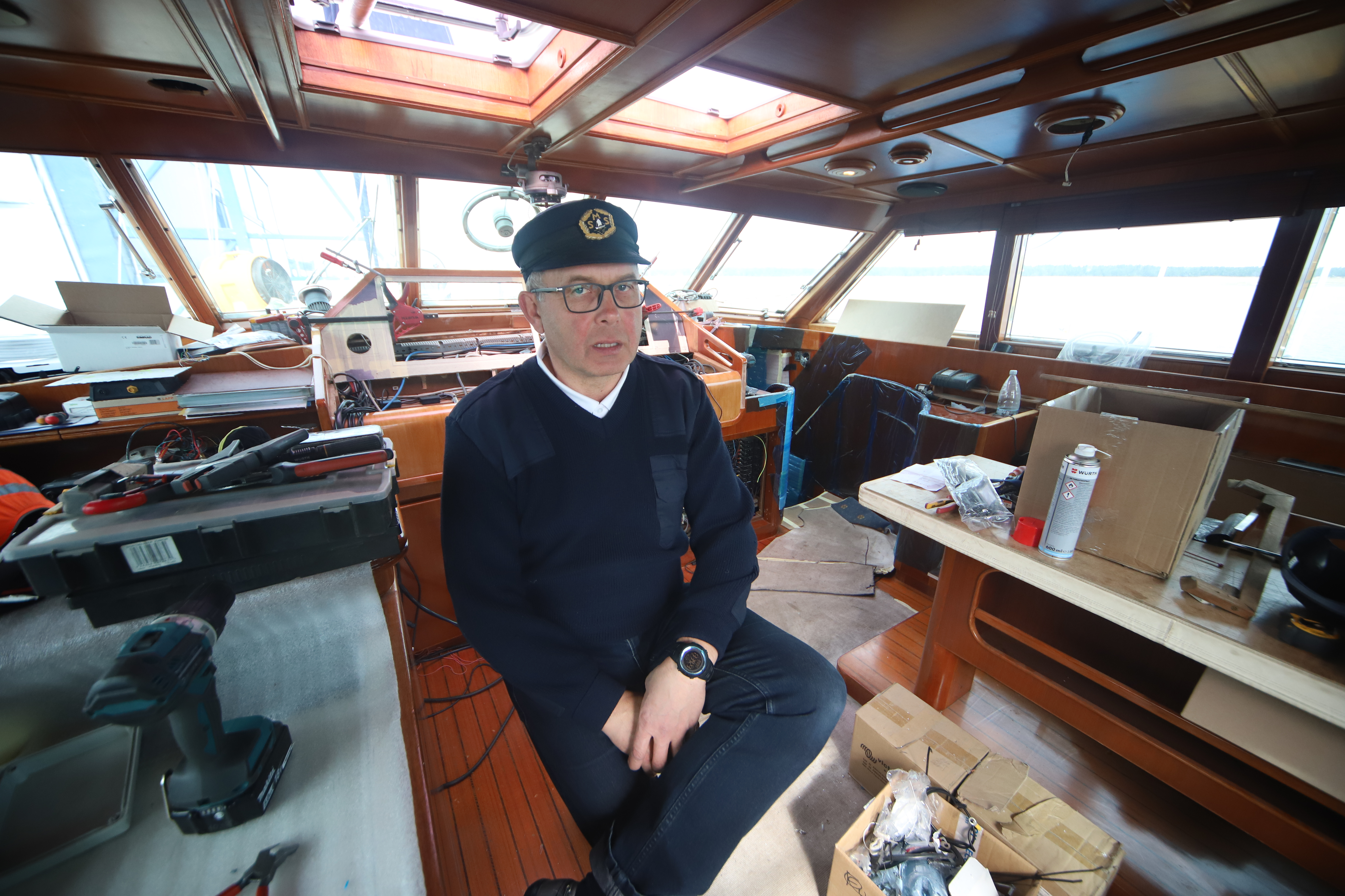 Admiral Bellingshauseni kapten Meelis Saarlaid 2019